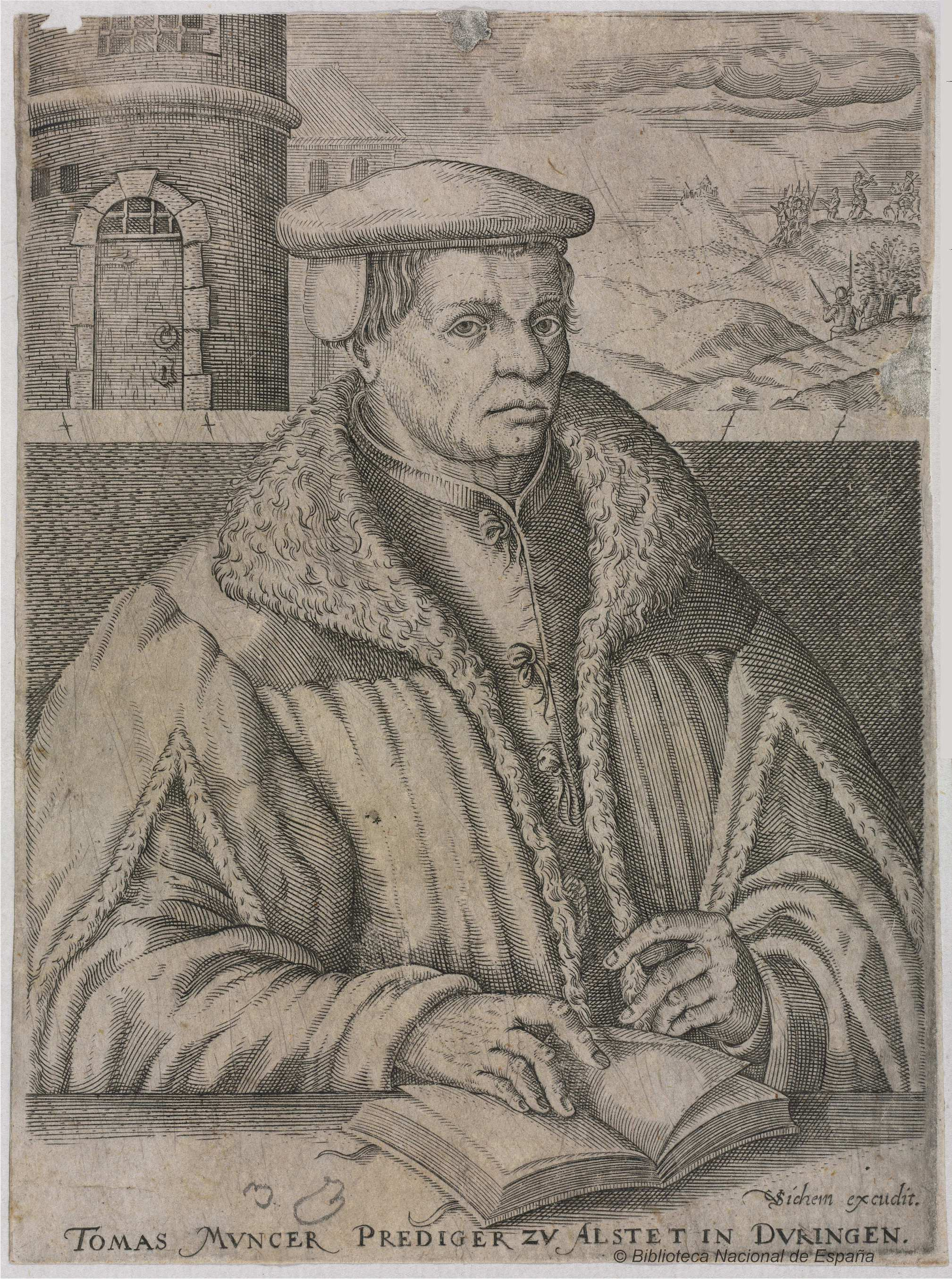 Thomas Müntzer-Serie de personajes ilustres firmada por Christoffel van Sichem como inventor y editor. Biblioteca Nacional de España